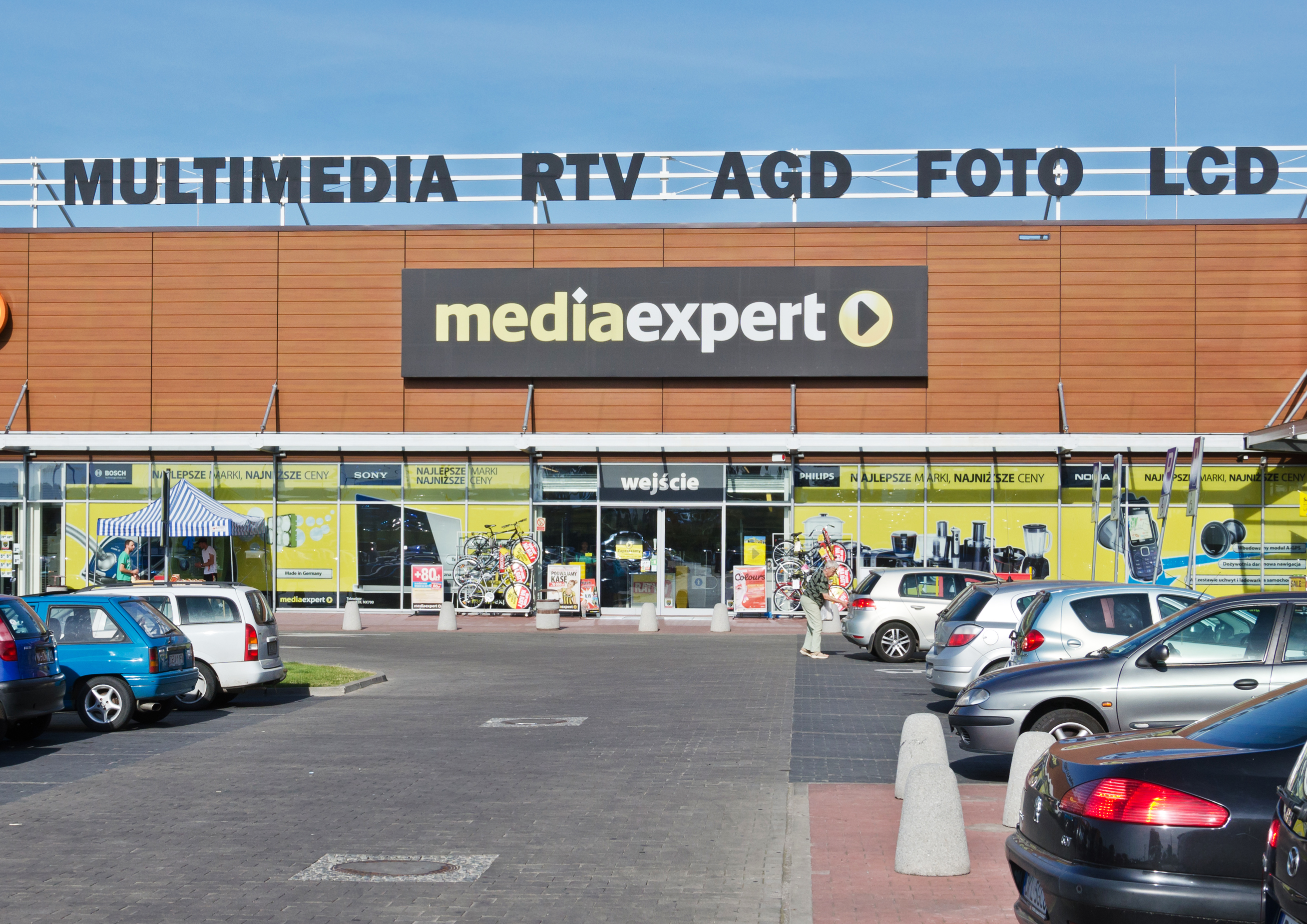 Galeria handlowa Twierdza Kłodzko